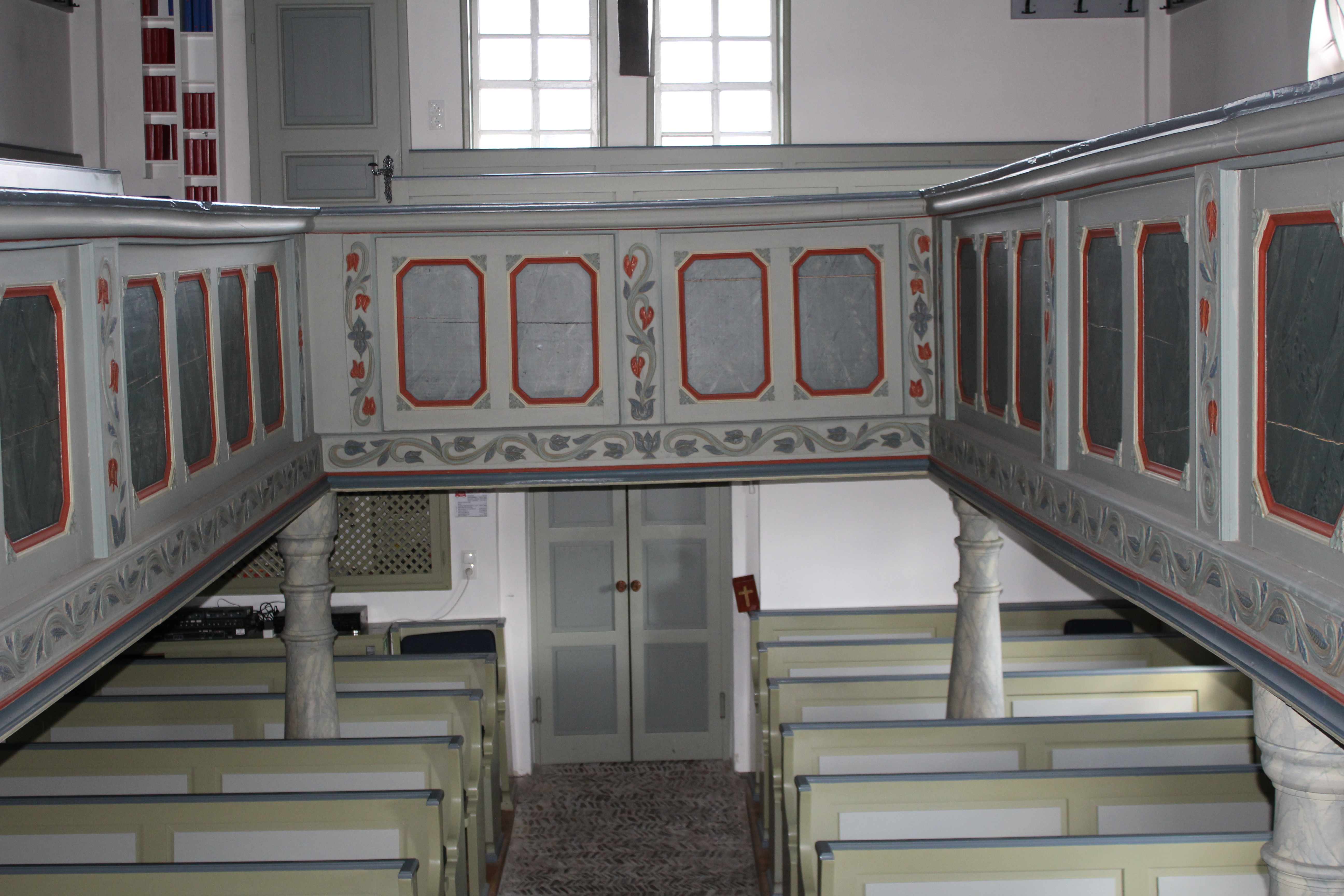 Ev. Kapelle Steinbrücken, Gemeinde Dietzhölztal, Hessen, Deutschland